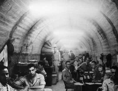 Malinta Tunnel headquarters in Corregidor